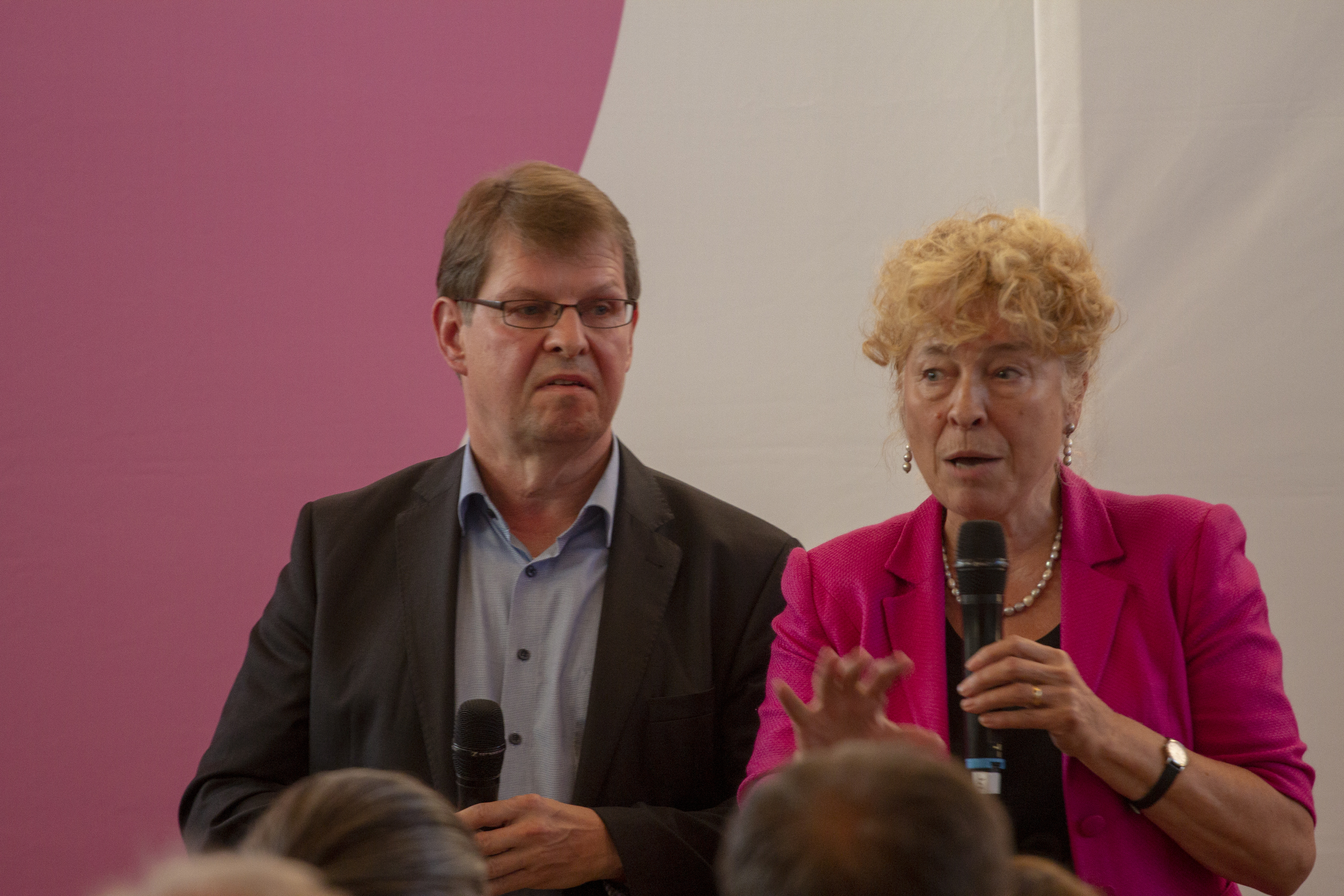 Team Gesine Schwan und Ralf Stegner bei der SPD Regionalkonferenz zur Wahl des SPD-Vorsitzes am 10. September 2019 in Nieder-Olm.